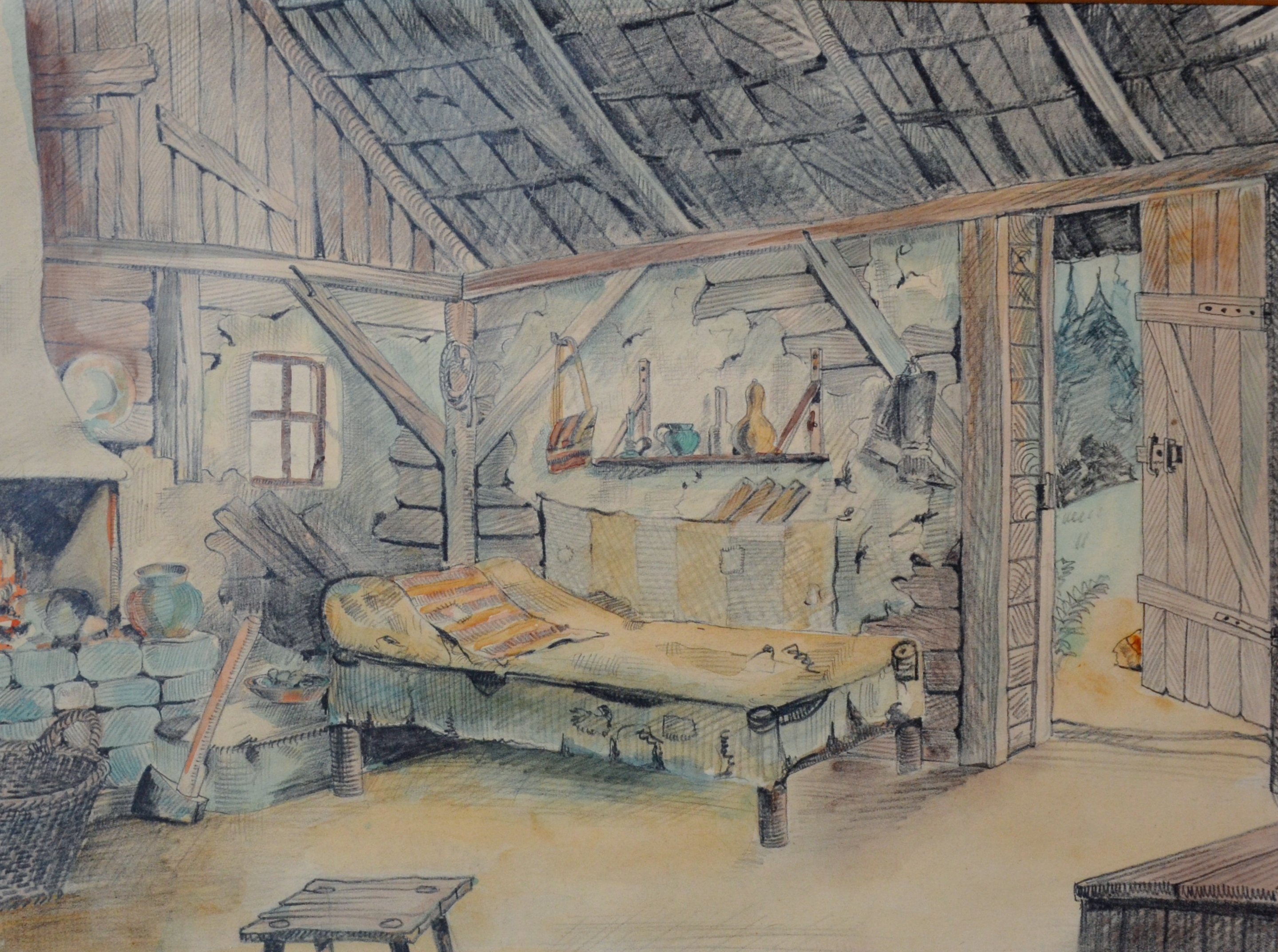 Elnémult harangok (Kalmár László, 1940) - Sőrés Imre díszletterve